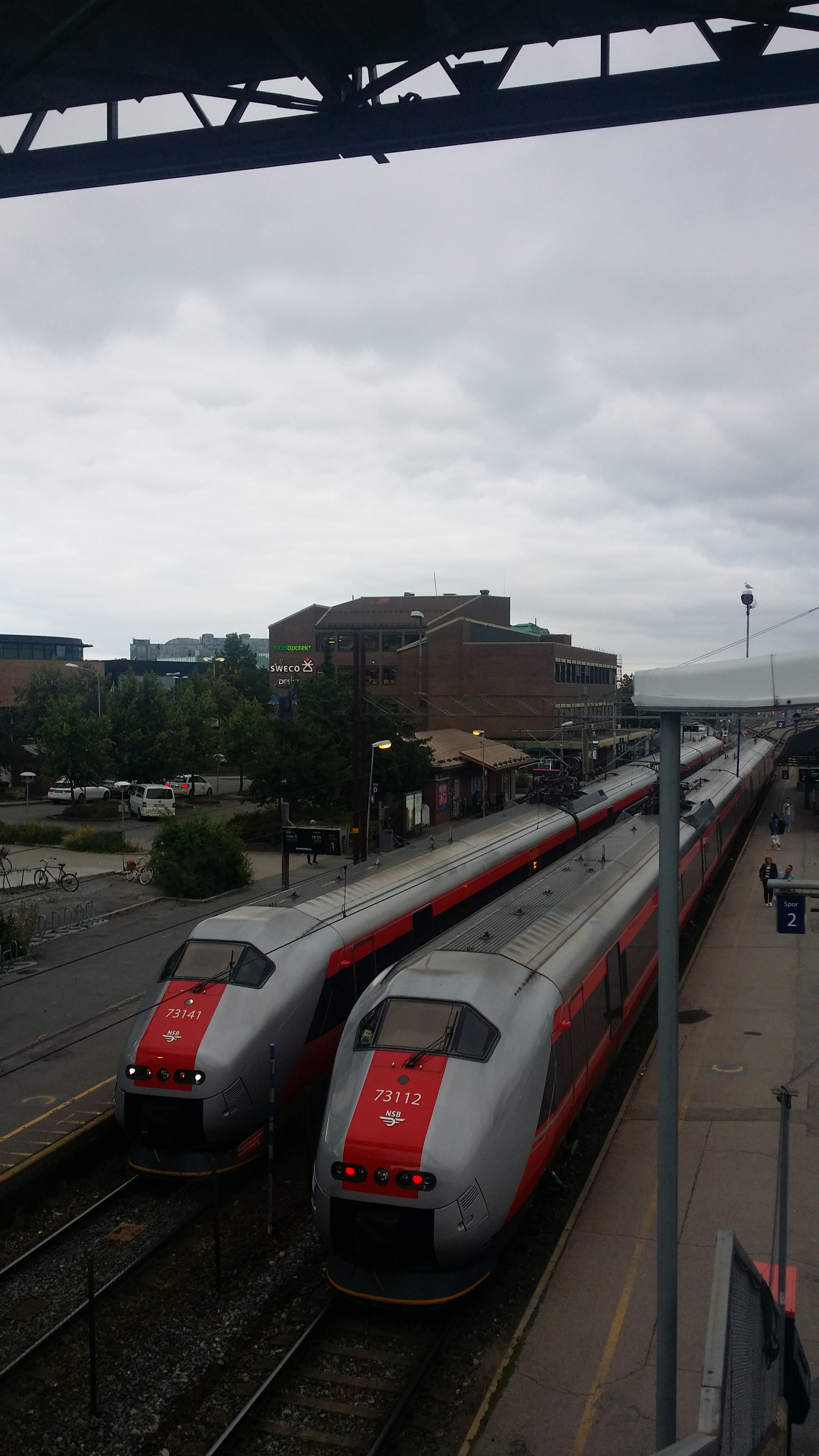 Ski stasjon med tog fra og til Halden.